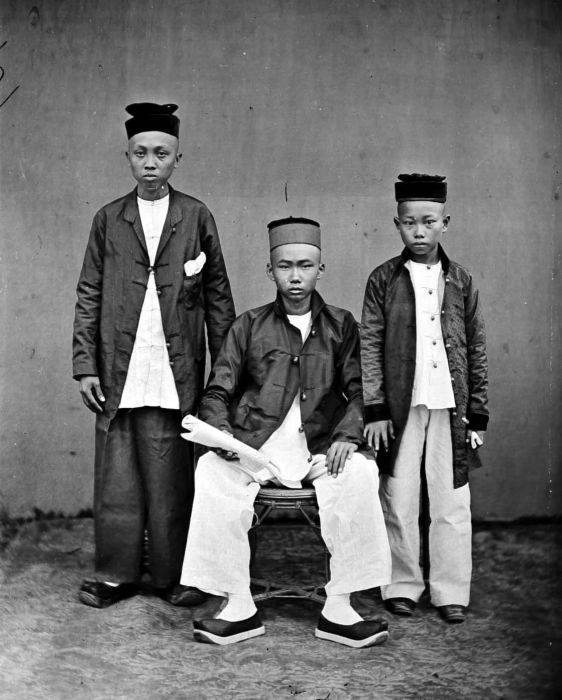 Negatief. Portret van drie jonge Chinezen